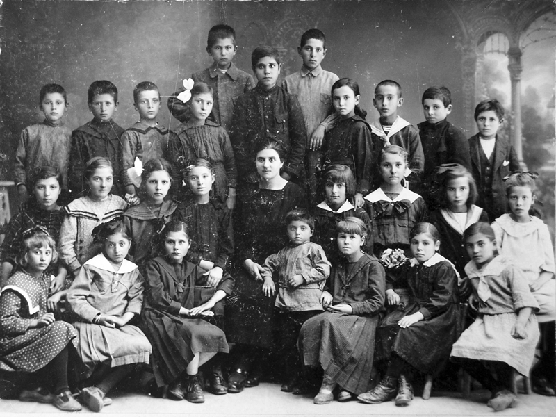 Ученици от ІV-то отделение /клас/ на училище “Г. Брегов”, юни 1921 г. Снимката е предоставена с любезното съдействие на РИМ – гр. Пазарджик